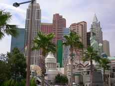 拉斯維加斯紐約紐約酒店。